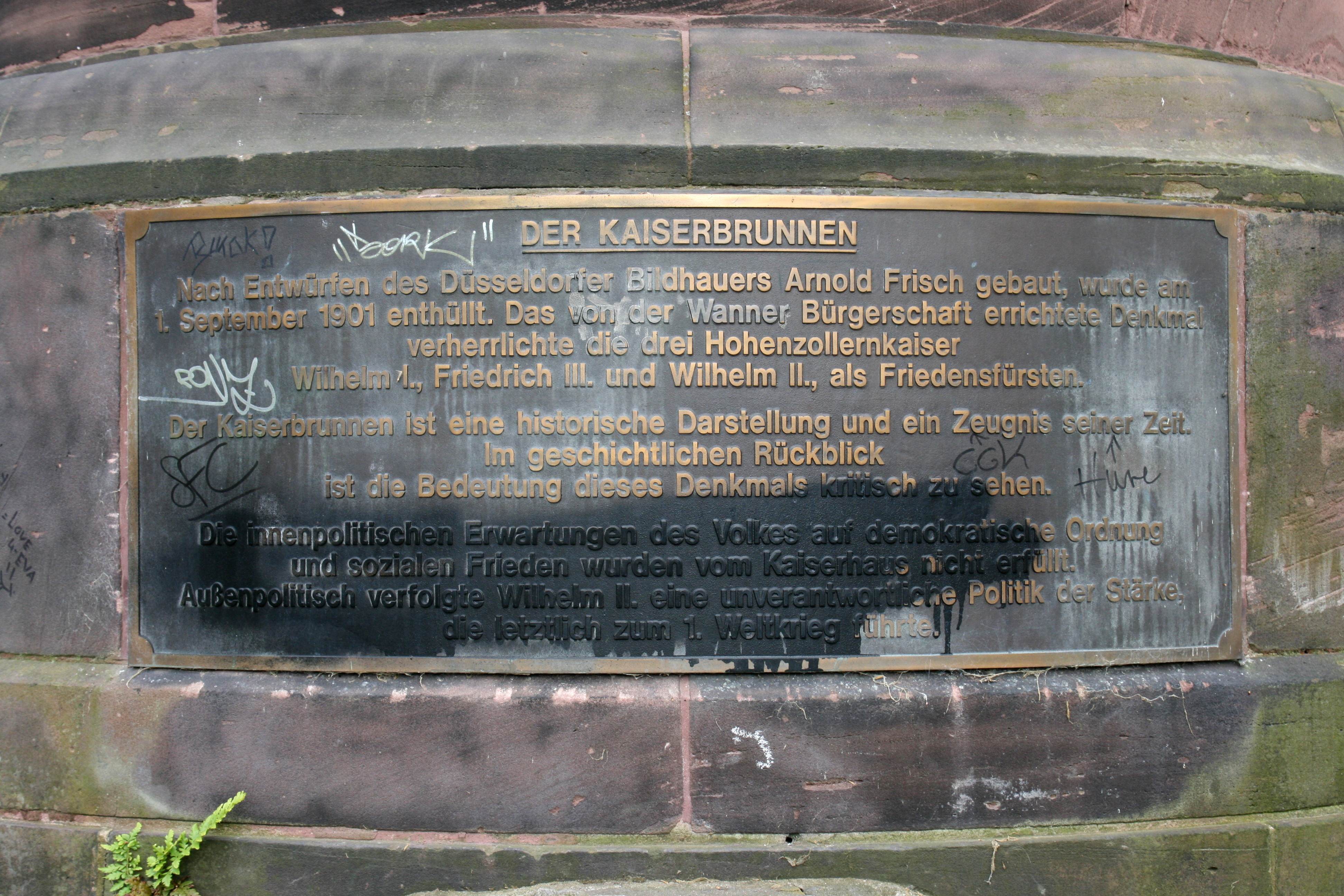 Kaiserbrunnen im Stadtgarten Wanne-Eickel, Am Böckenbusch in Herne